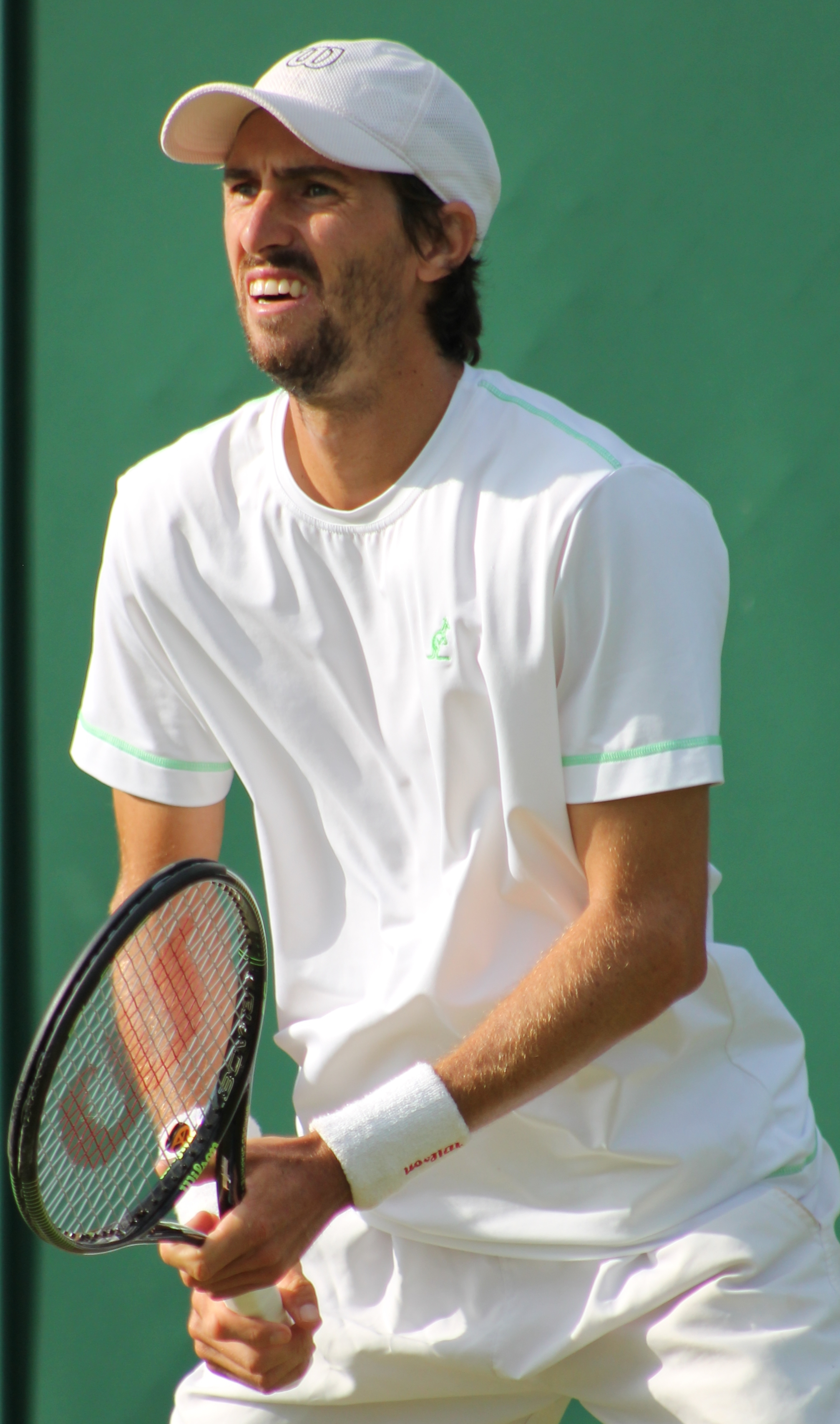 Molteni WMQ15 (15)